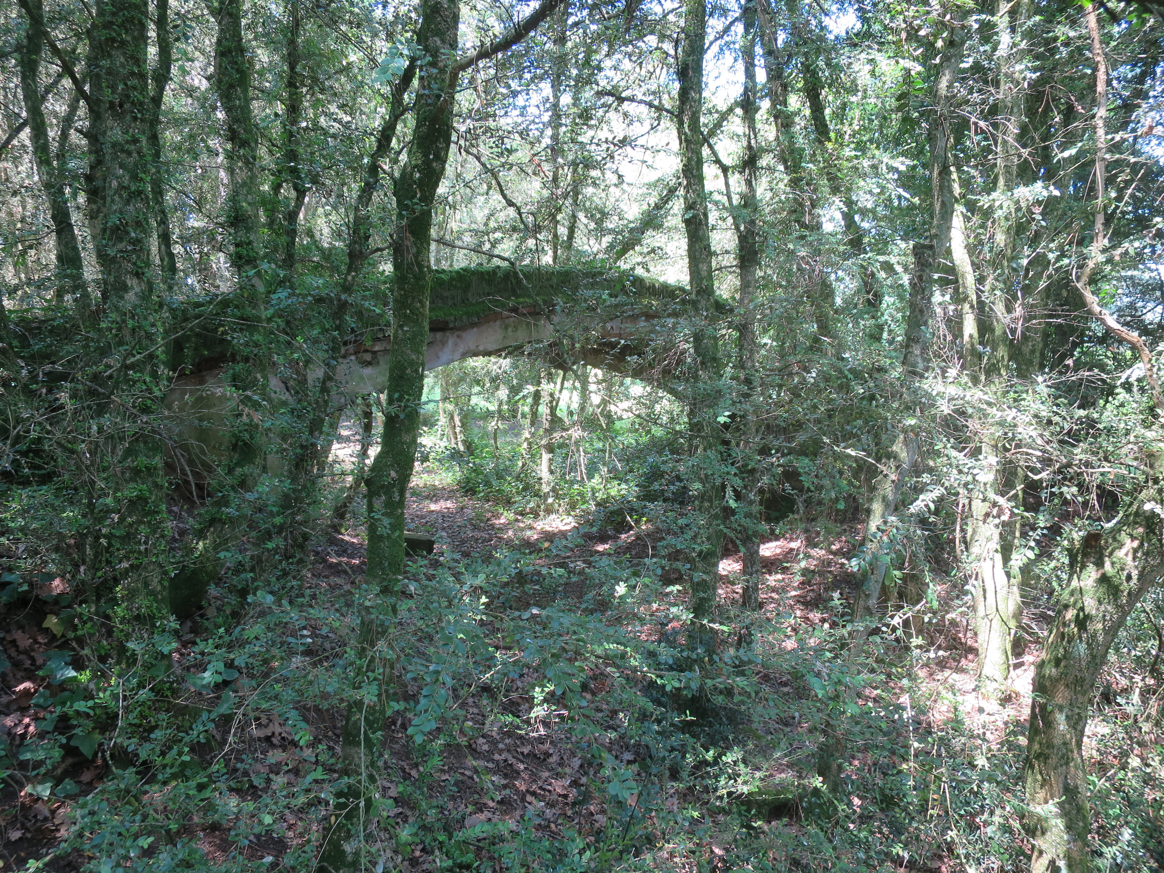 Villa Lebrun, Marssac-sur-Tarn, Betonbrücke